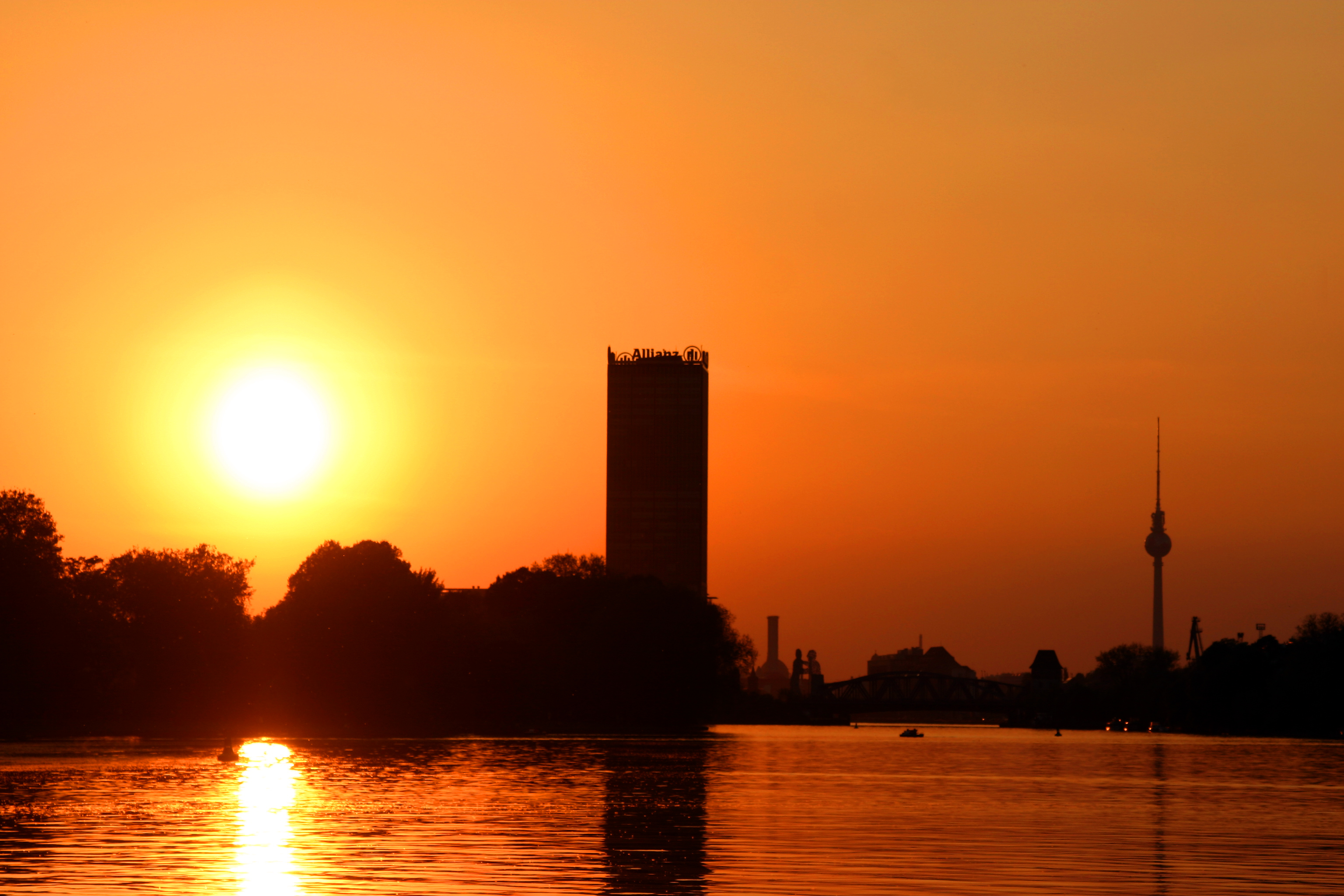 Sonnenuntergang an den Treptowers